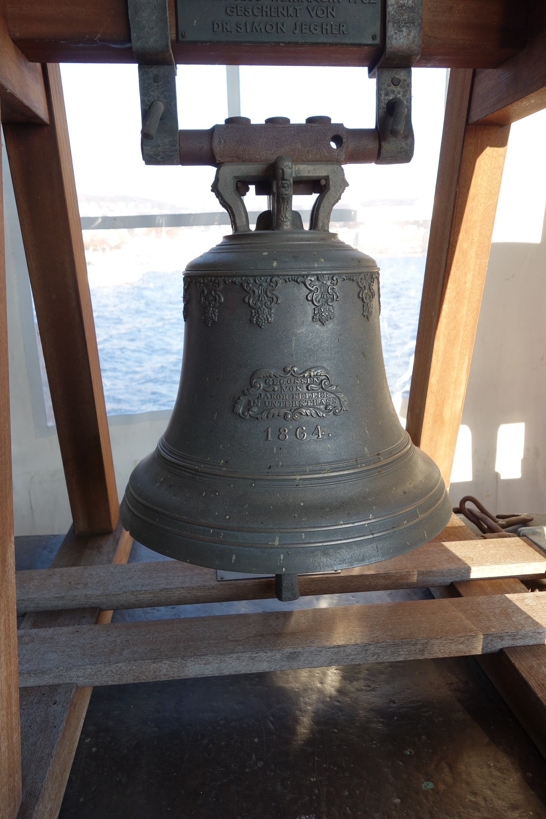 Glockengiesserei Jakob Keller, Zürich-Unterstrass, Schweiz, 1864